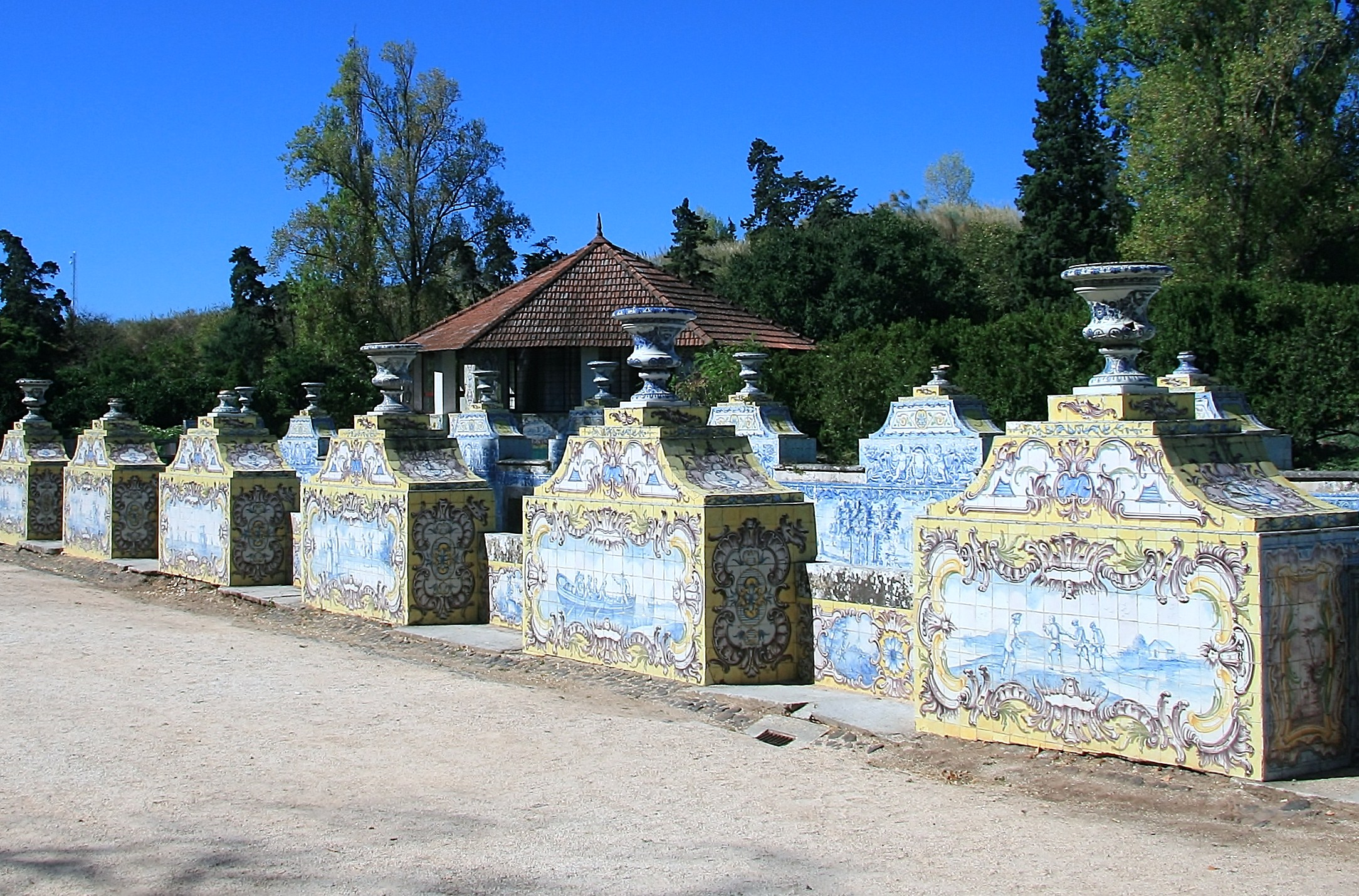 Канал Азулежу в саду Национального дворца Келуш, Португалия.